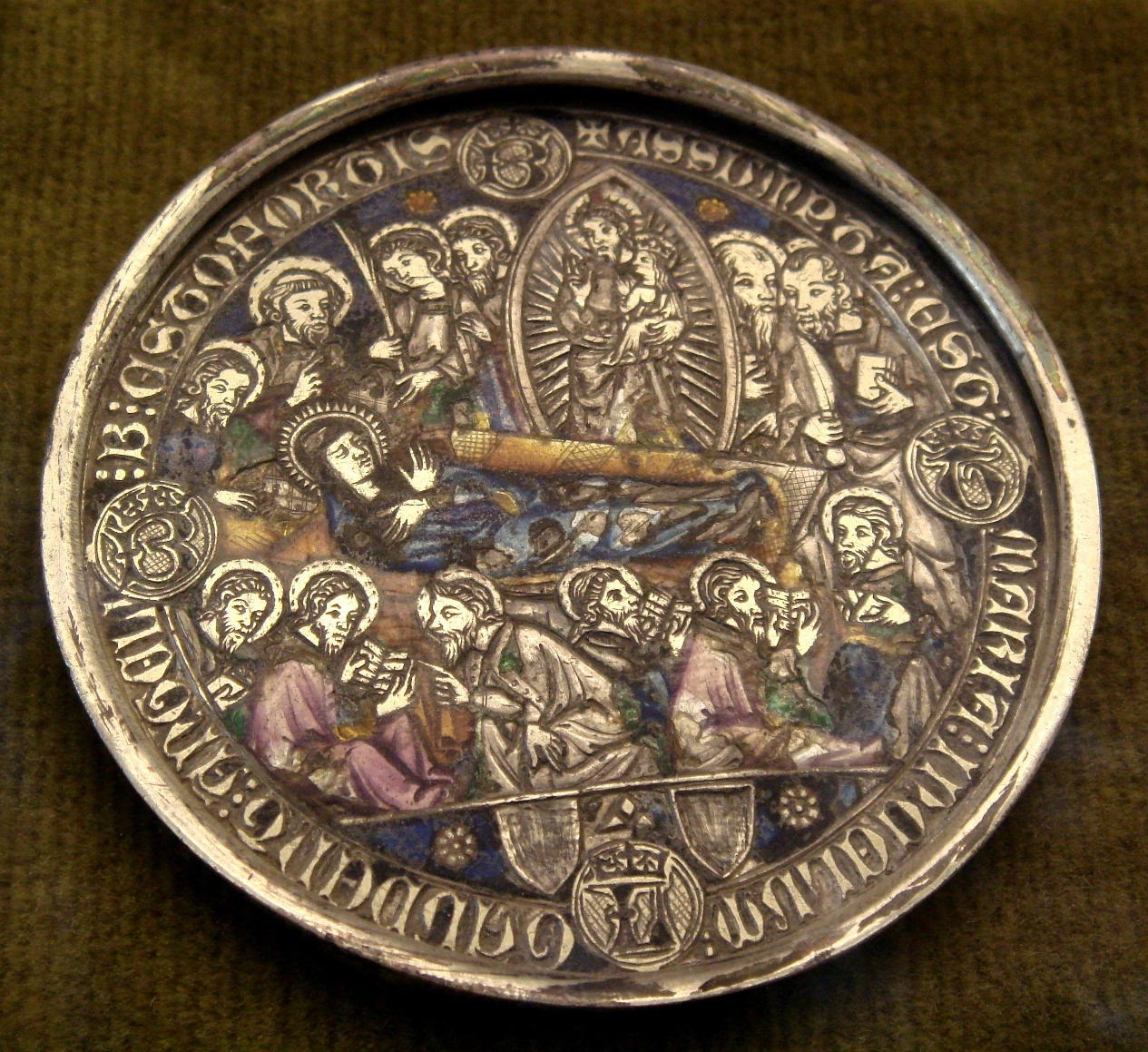 Plata dorada y esmalte traslúcido (basse-taille) s. XIV, Limoges (Francia) Museo Arqueológico Nacional, Madrid Inv. 52144, Inscription "Assumpta est Maria in coelum" or "Assumption of the Virgin Mary into Heaven"